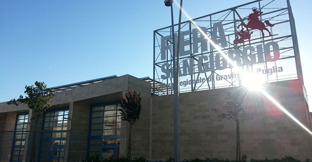 Fiera di San Giorgio